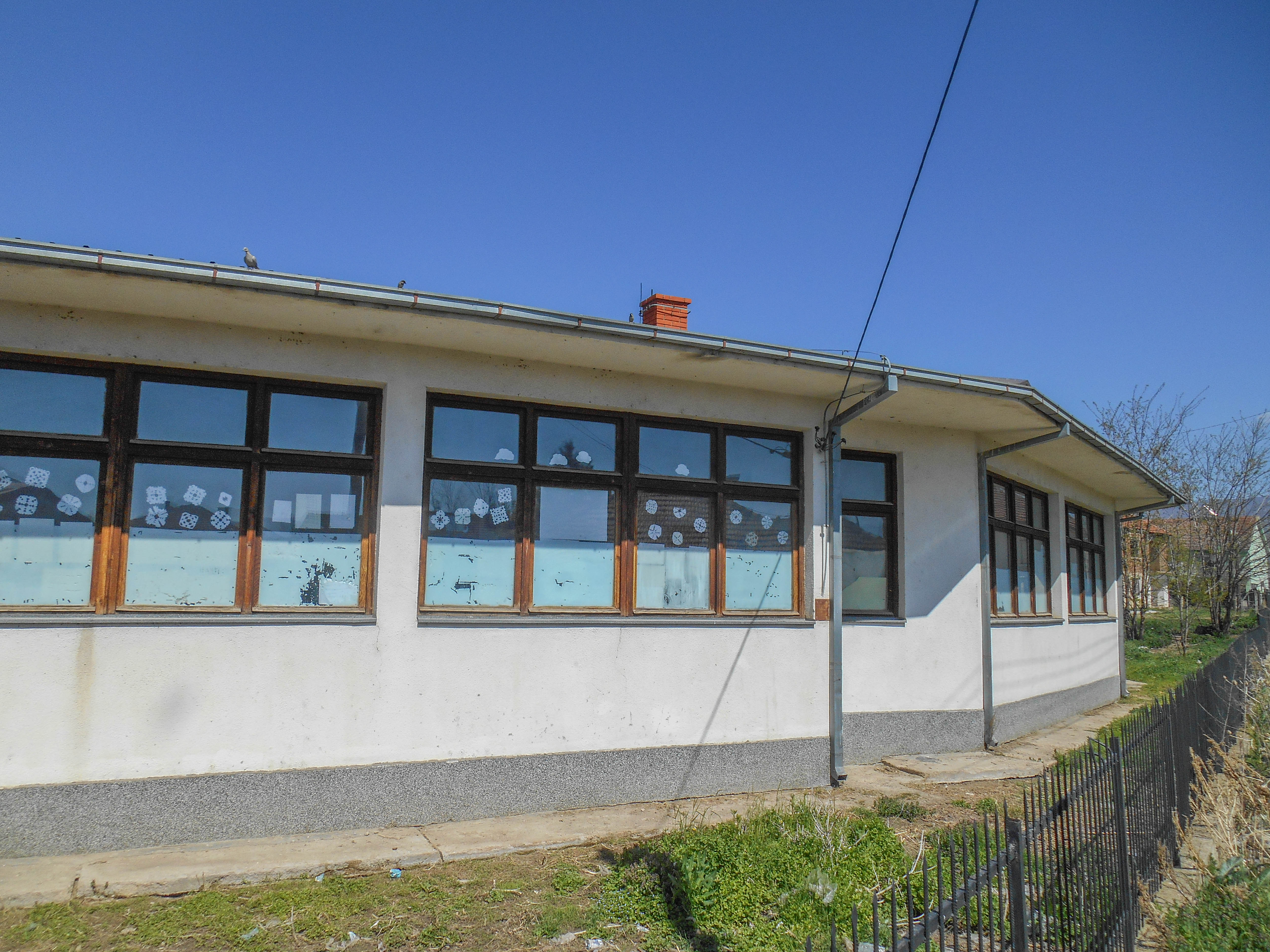 Основно училиште „Кољо Китанов“ - Сарај